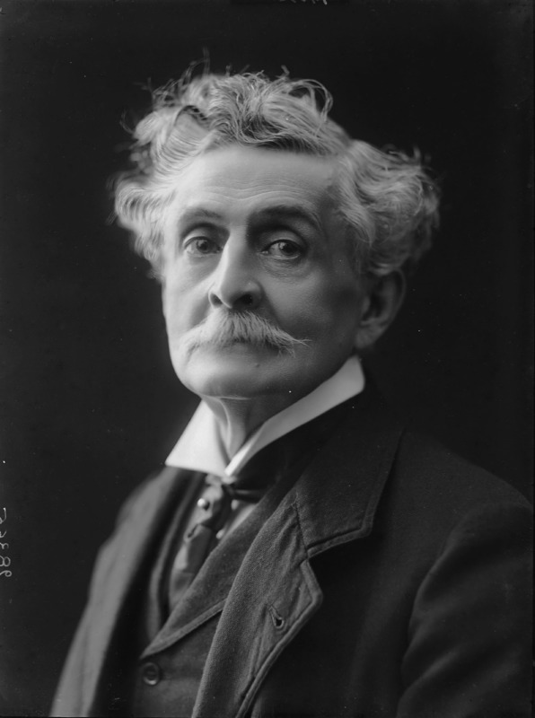 Luigi Suñer fotografato da Mario Nunes Vais